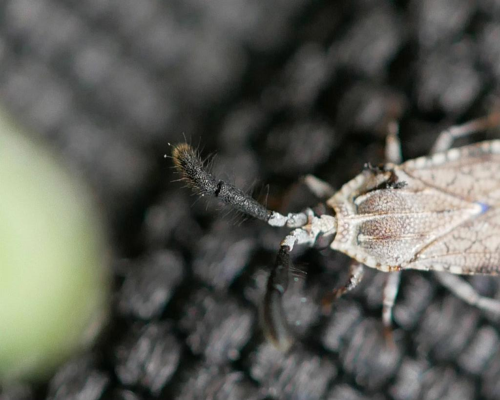 2019/08/13 和歌山県上富田町：Kamitonda Town, Wakayama Pref. Japan